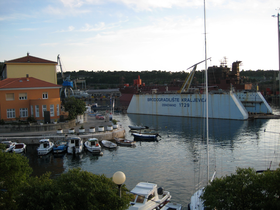 Kraljevica